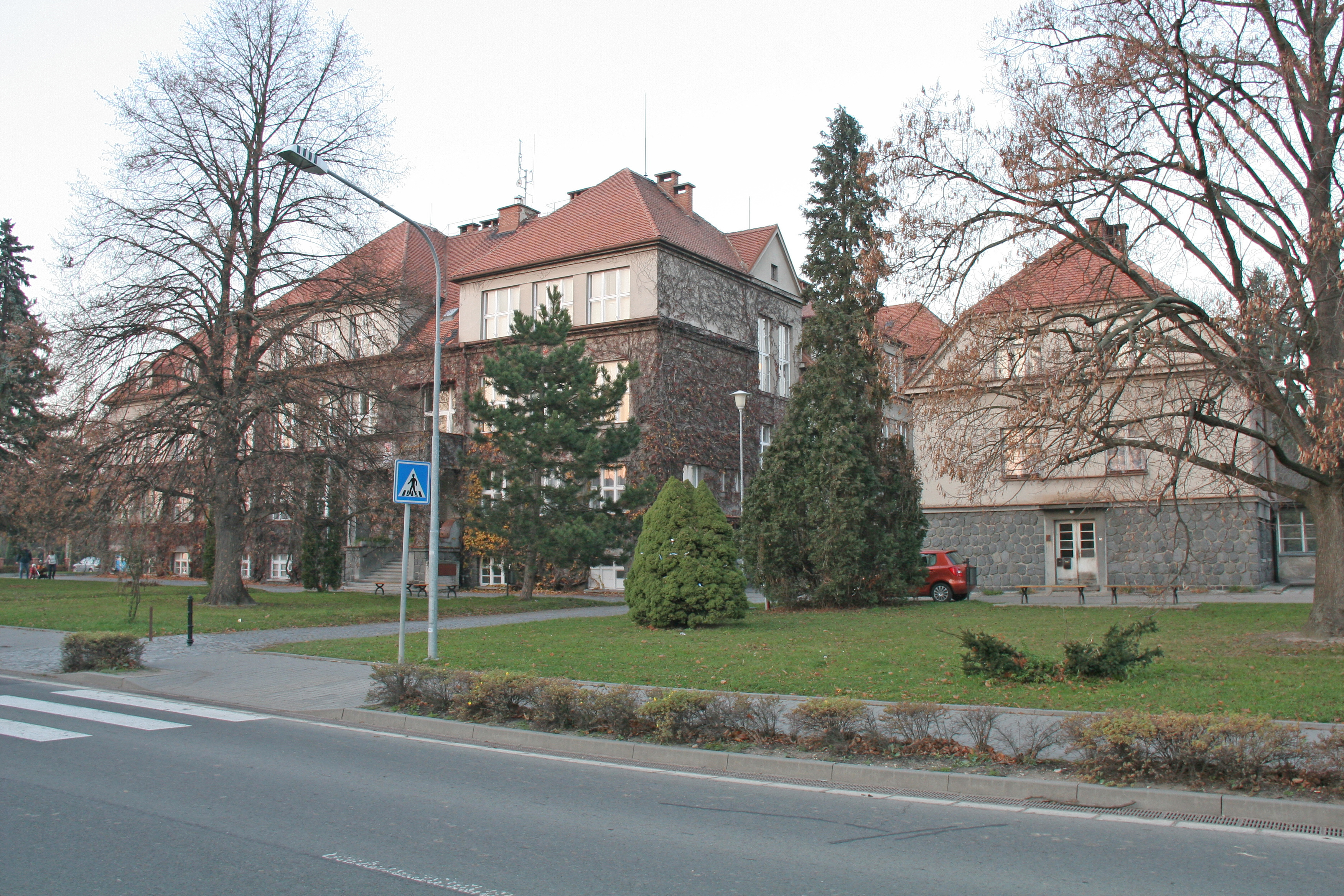 Škola (Dolní Roveň), Dolní Roveň 200